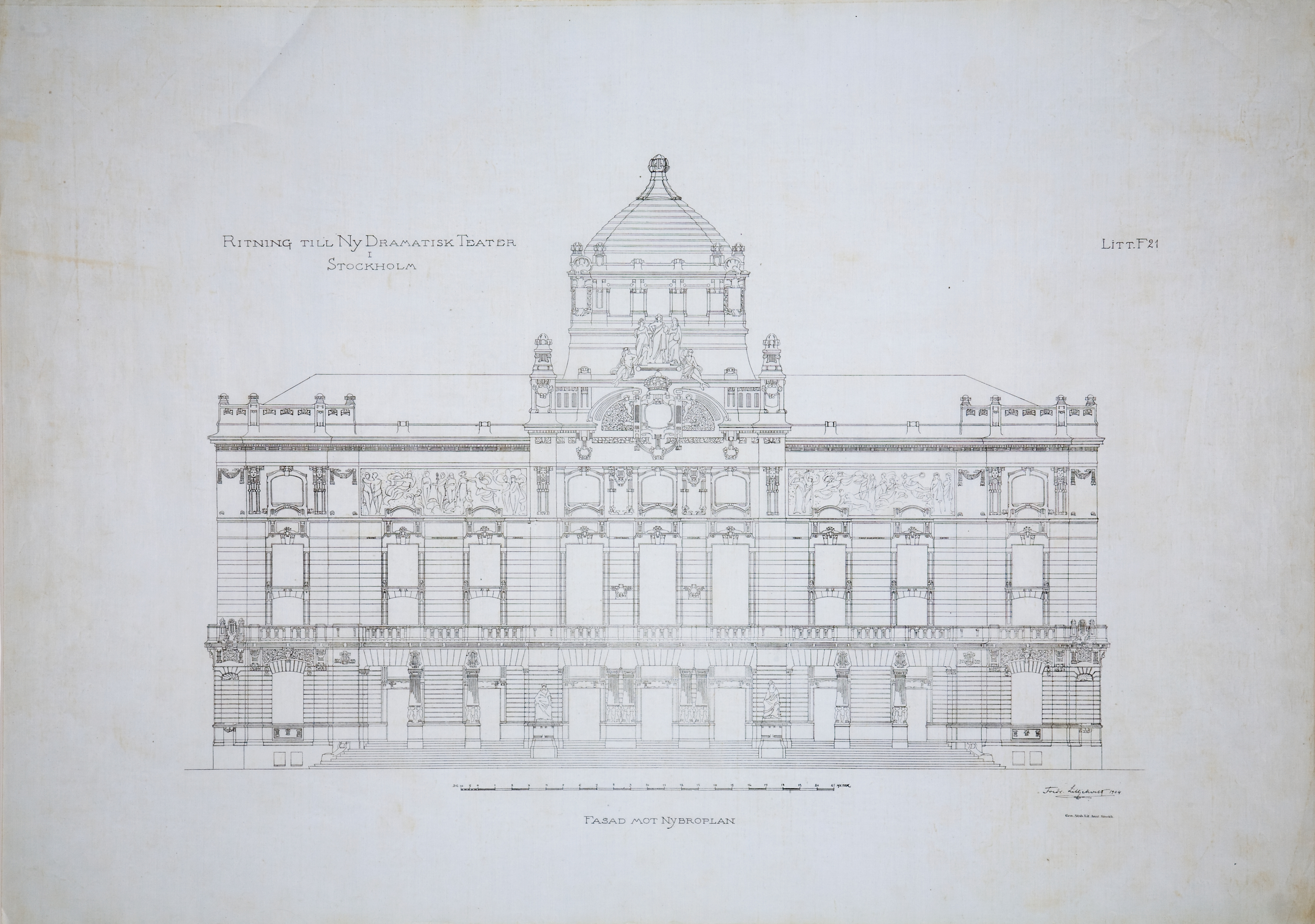 Blueprint of Kungliga Dramatiska Teatern in Stockholm, Sweden